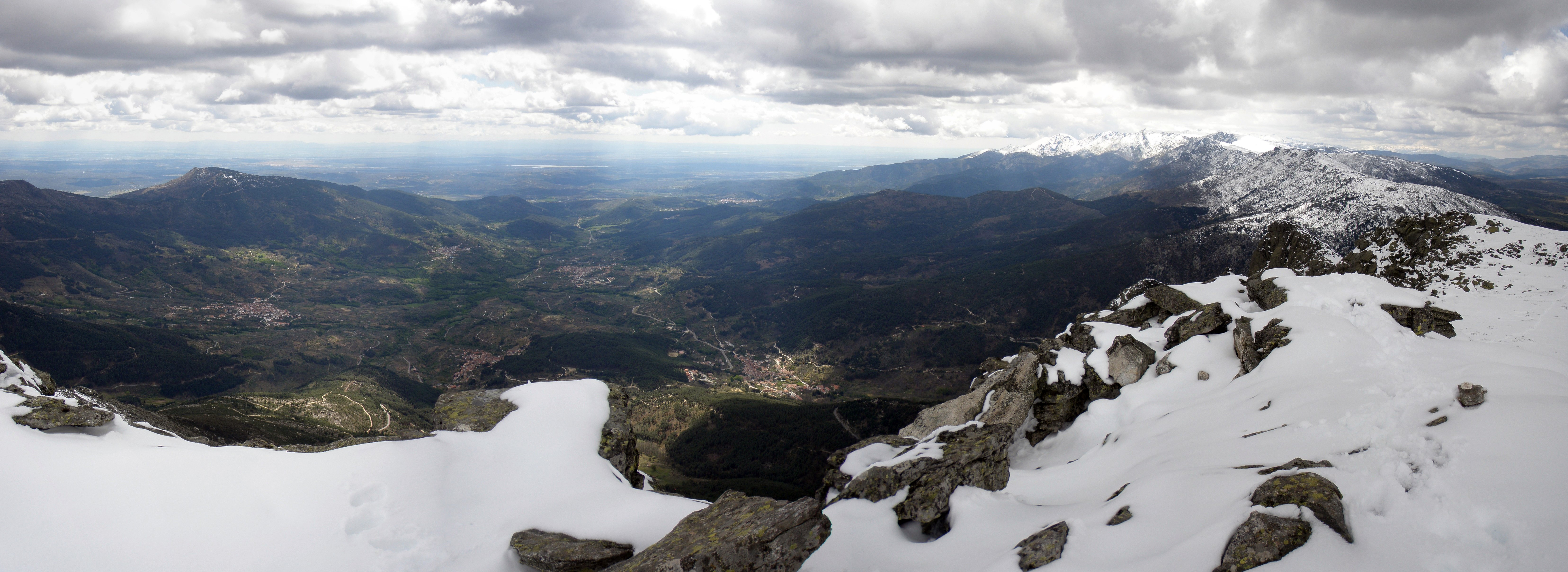 Valle de las Cinco Villas desde Pico Torozo (Sierra de Gredos)